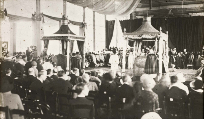 Deze foto is genomen tijdens de reis van B.Ph. van Harinxma thoe Slooten en G.A. Brouwer dwars door Abessinië naar Kenia (1930-1931)